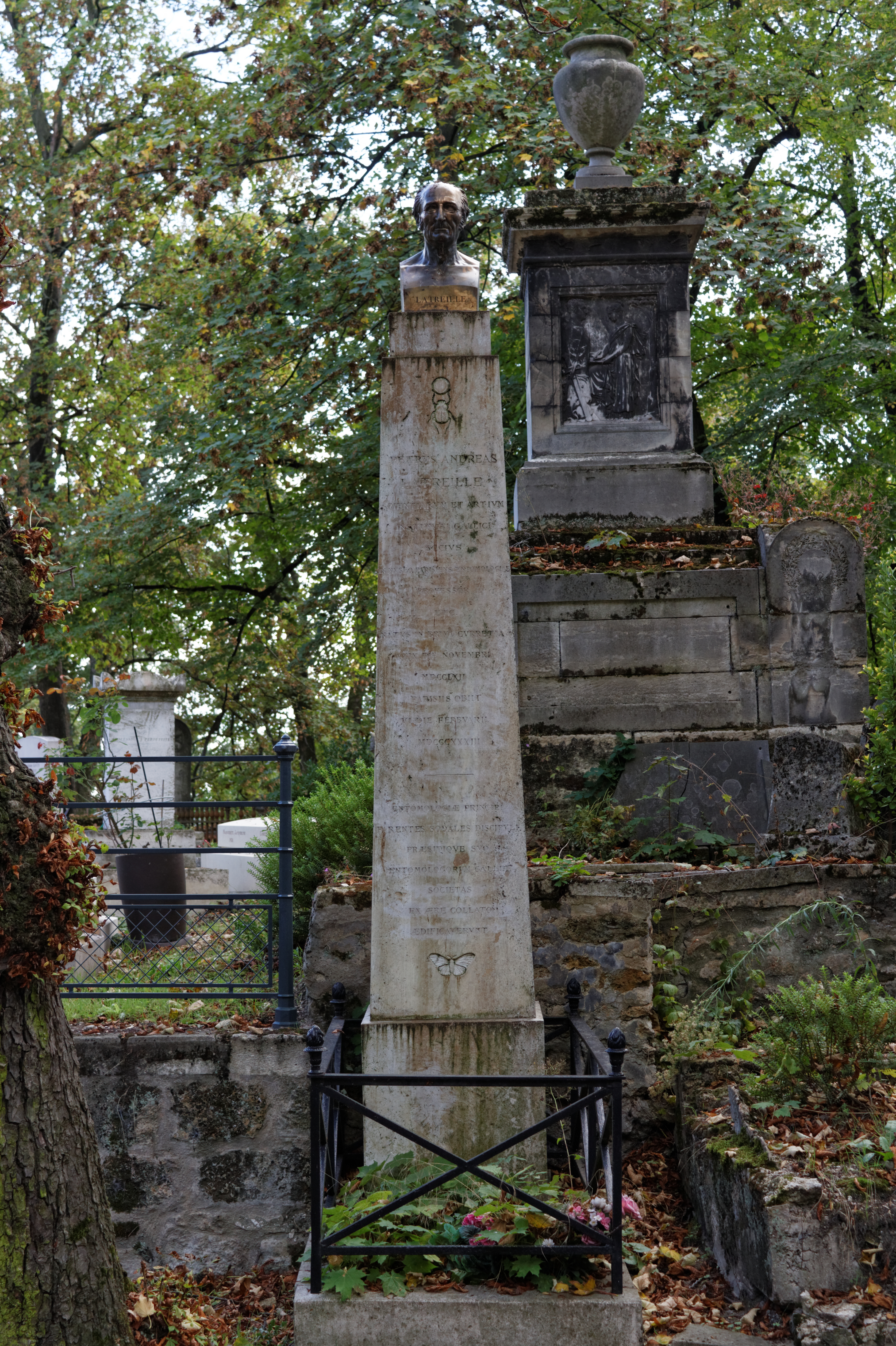 Obélisque surmonté d'un buste en bronze signé P. Merlieux, 1833.